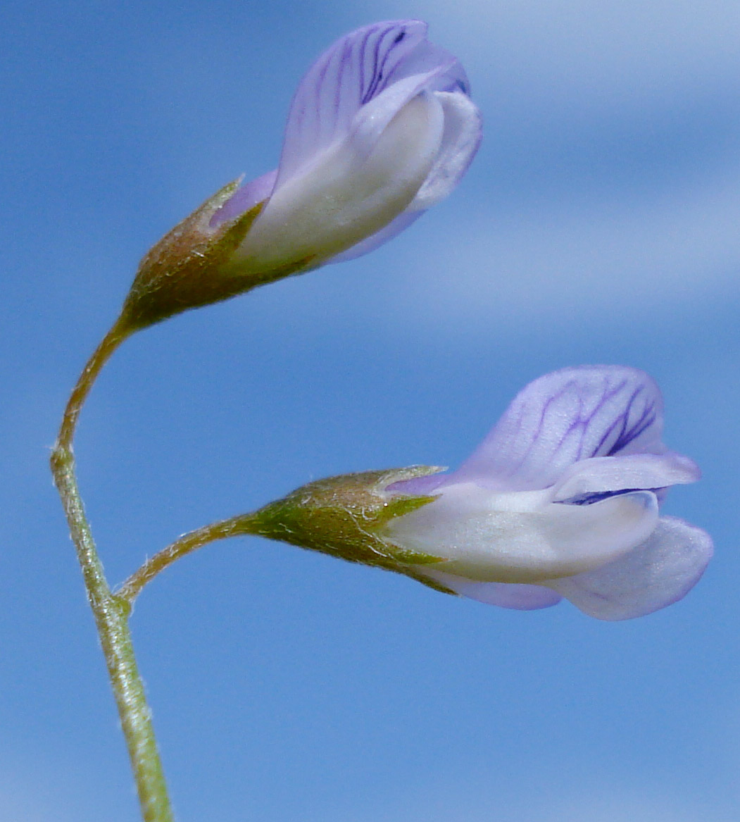 Vicia tetrasperma (Unterfranken, Germany)